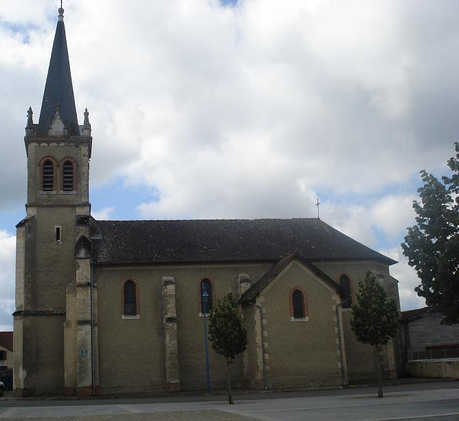 Eglise Nouilhan